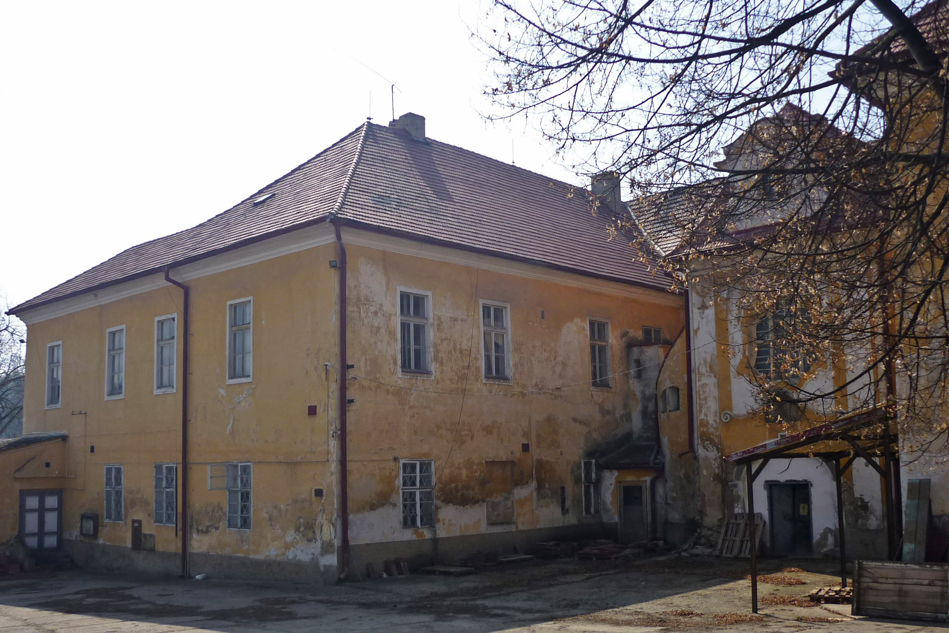 Schloss in Liboritz bei Saaz (Libořice, Okres Louny)